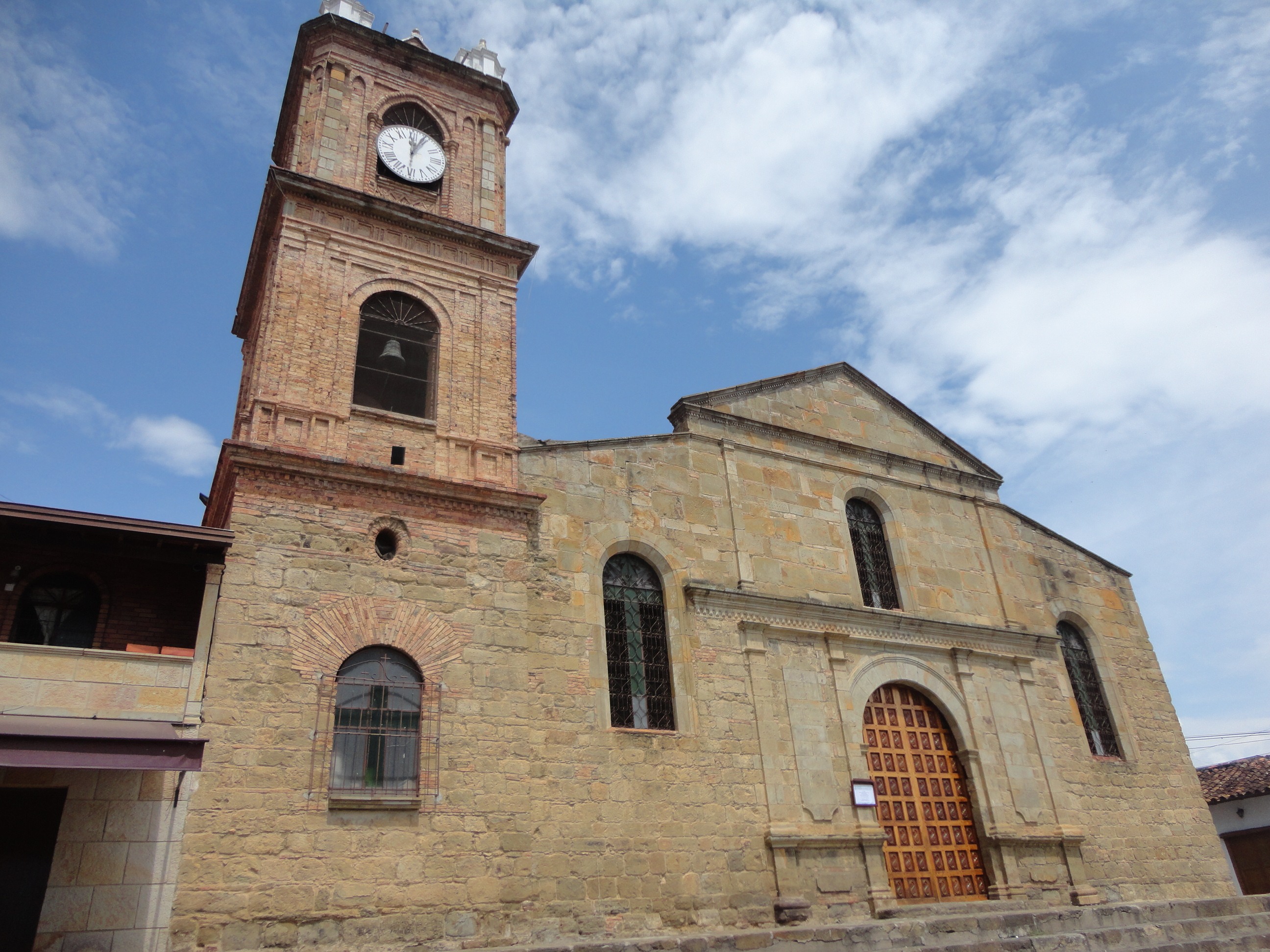 Ubicación: SOCORRO, SANTANDER